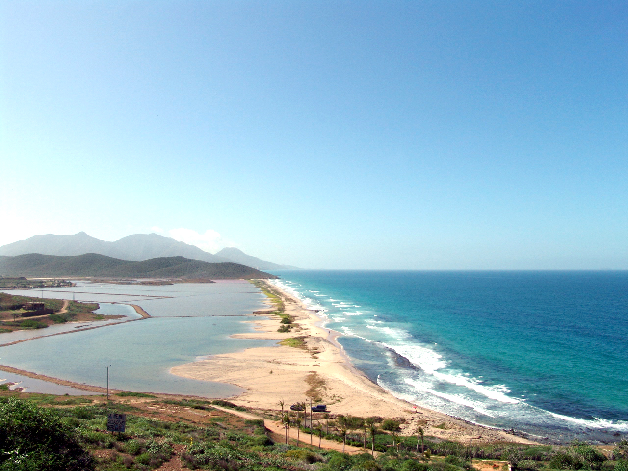 Playa La Salina, Margarita, Nueva Esparta, Venezuela